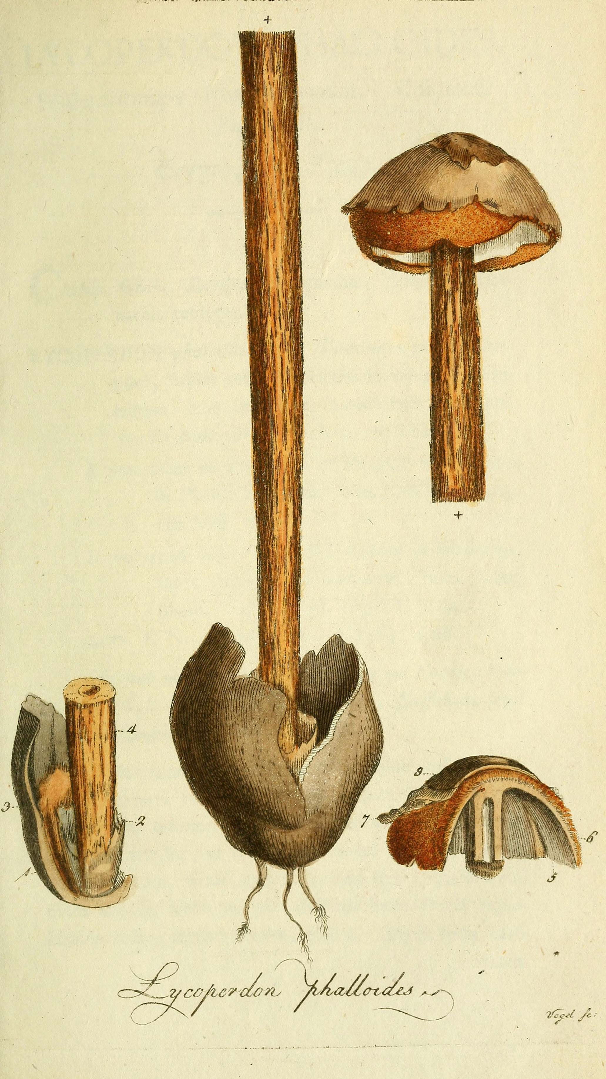 'cc/ter cccn^ fs/Latt& GUJ ^\ /■■. A